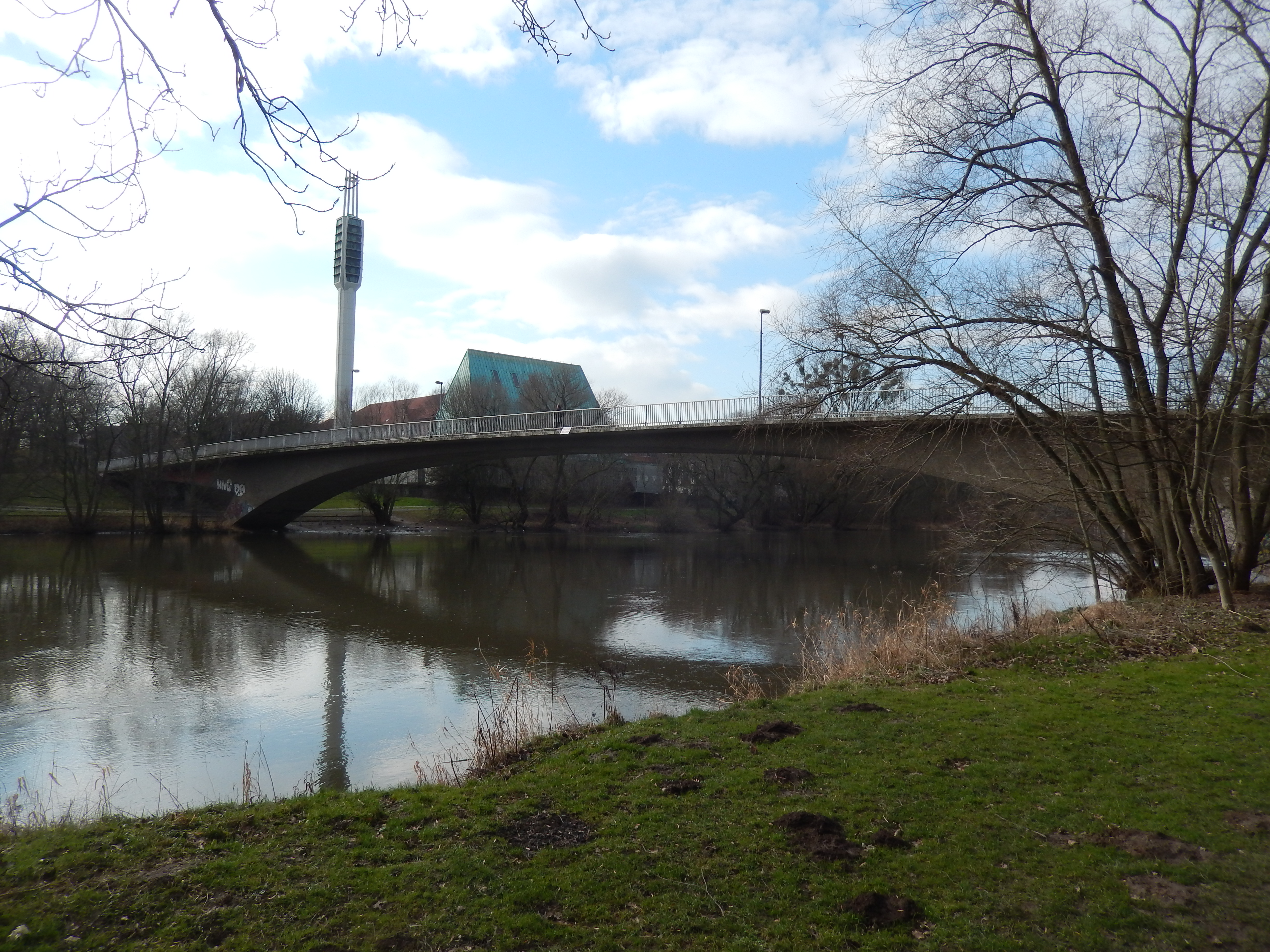 Dornröschenbrücke